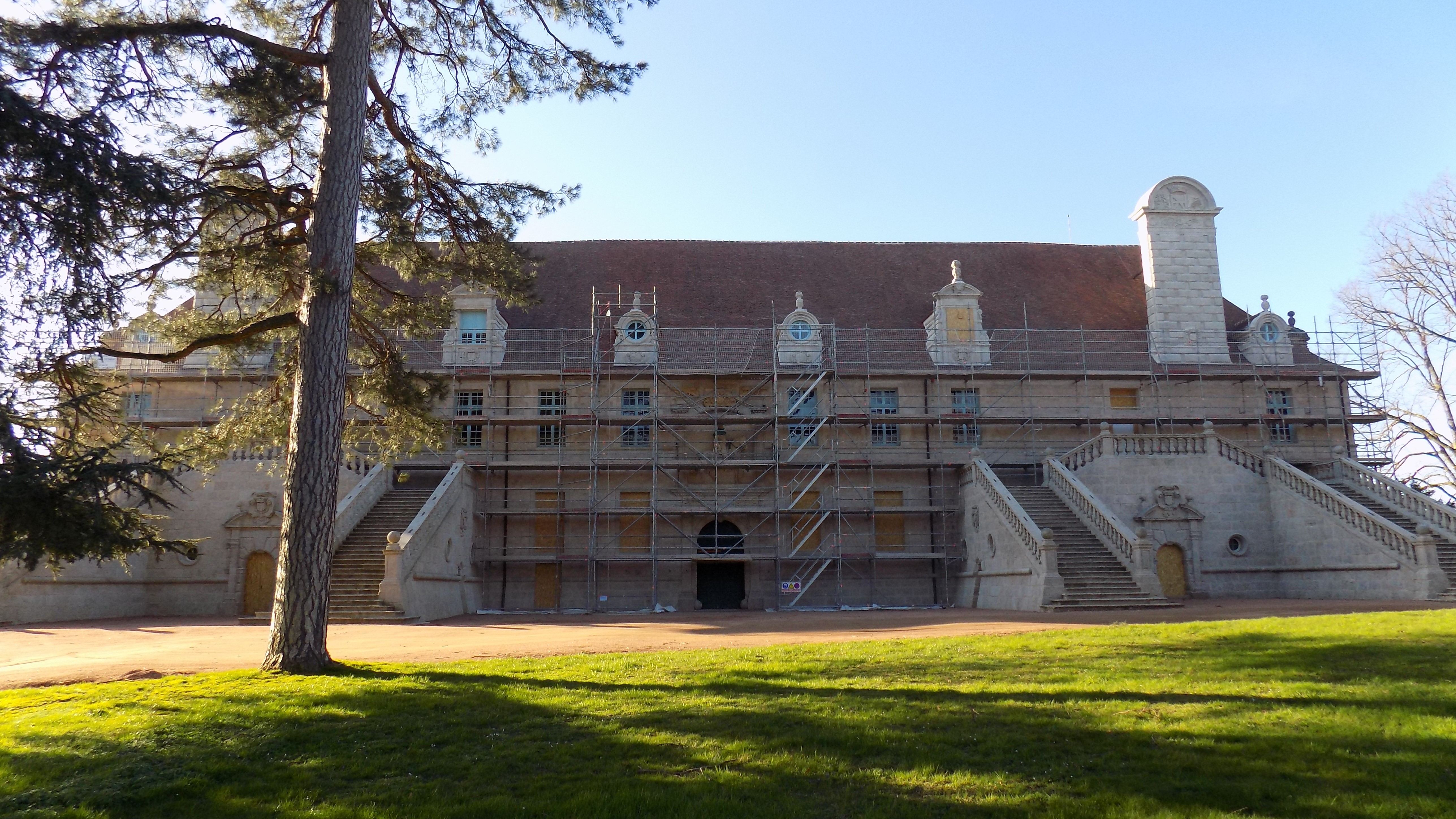 Ecuries du château de Chaumont en Charolais, façade en cours de restauration, avril 2020.